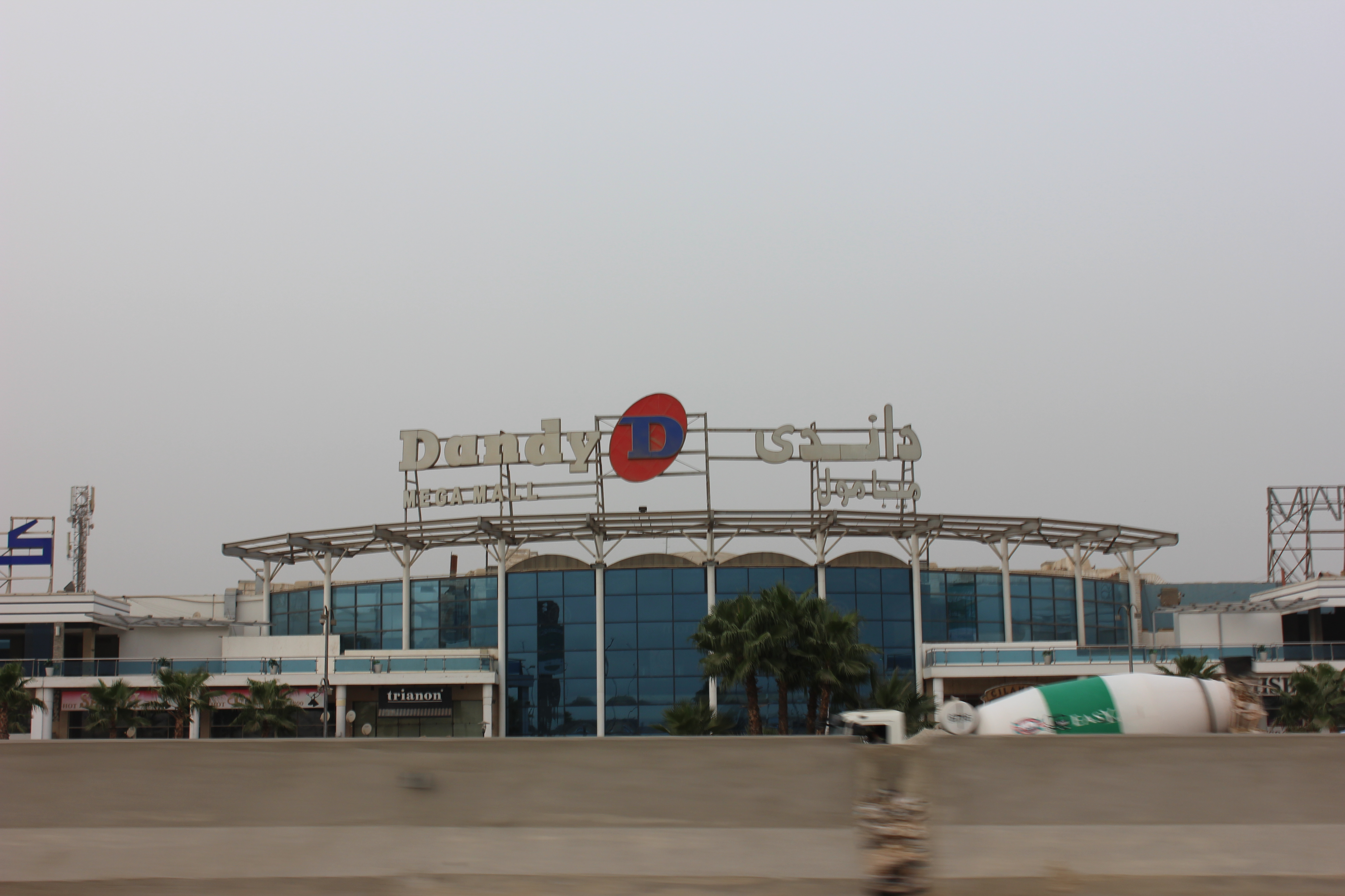 داندي مول بالقاهرة.